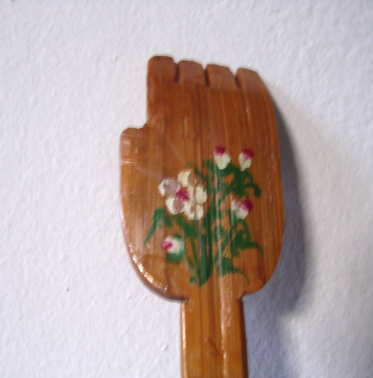 Rückenkratzer (Detail